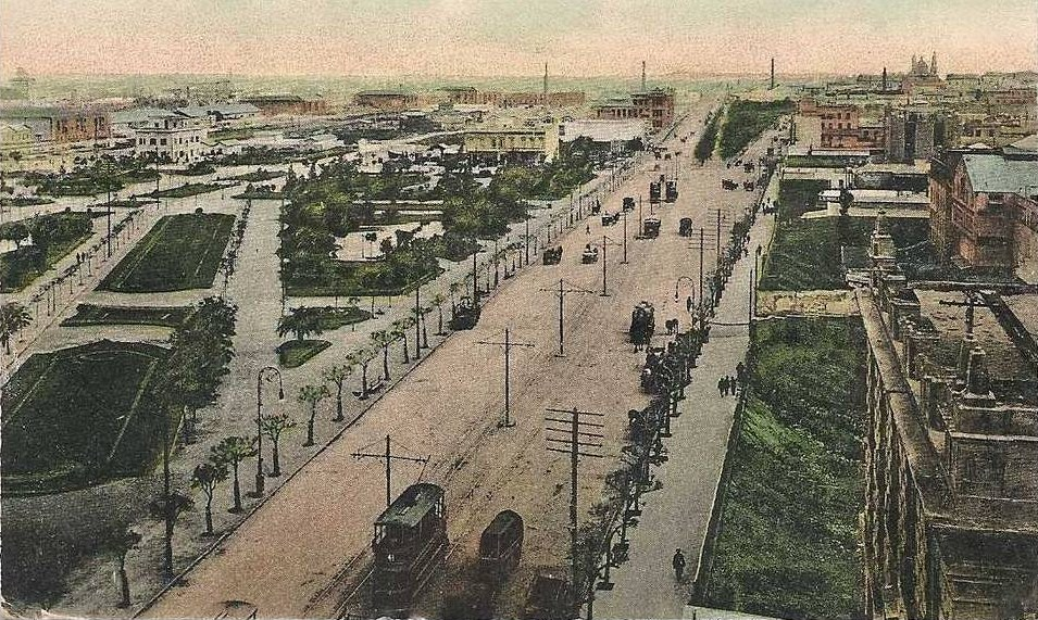 Vista de la Avenida Paseo Colón en Buenos Aires hacia 1905, desde la Casa Rosada mirando hacia el sur. Se ve la plaza en donde luego se construiría el Ministerio de Defensa, y los silos de Puerto Madero.